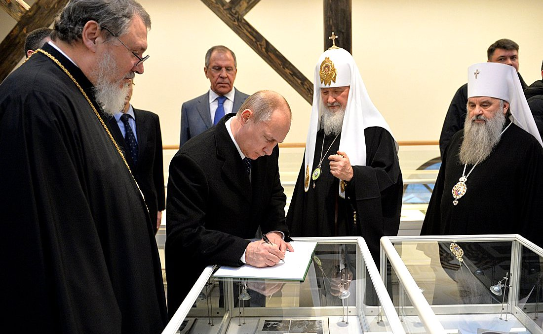 Владимир Путин в храме преподобного Сергия Радонежского в Царском Селе, 8 декабря 2014 года